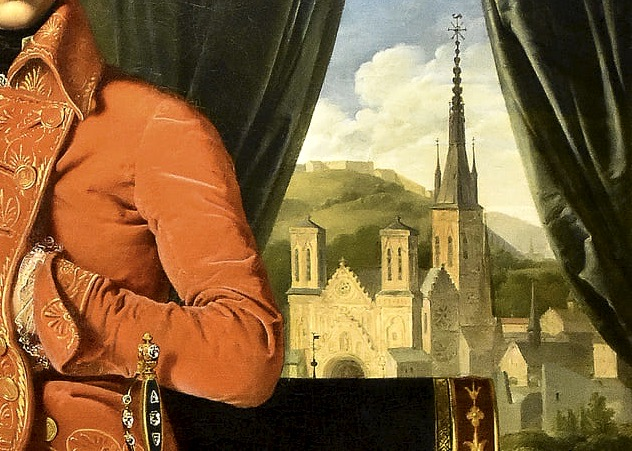 Jean-Auguste-Dominique Ingres (1780–1867): Der Erste Konsul Napoleon Bonaparte 1803 in Lüttich. Ausschnitt: Die ehemalige Lambertuskathedrale. (Das in der Revolutionszeit säkularisierte Kunstdenkmal mit seinem 135 Meter hohen Ostturm war in Wirklichkeit bereits eine Ruine.) Grand Curtius, Lüttich.